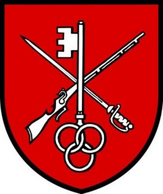 Wappen von Le Chenit Kanton Waadt Schweiz